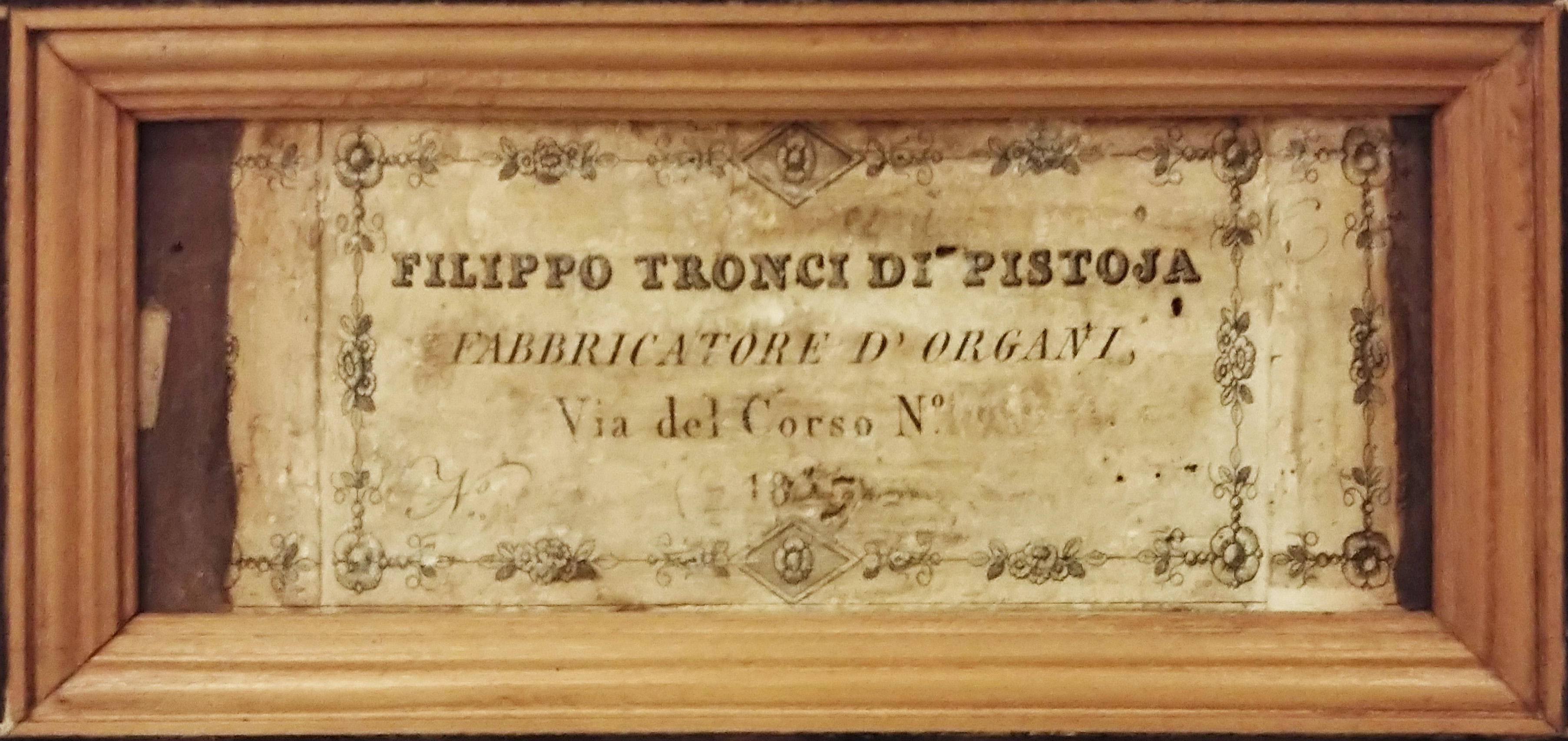 Cartellino con il nome del costruttore (Filippo II Tronci, 1837).